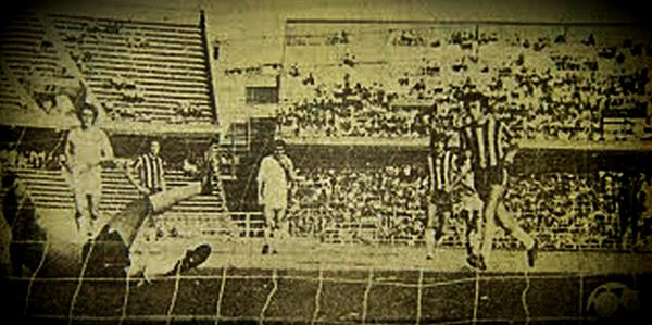 Partido del 20 de mayo de 1979, Rosario Central 3-Lazio 0. Torneo amistoso Semana de Mayo. Gol de Miguel Ángel Manzi de penal.